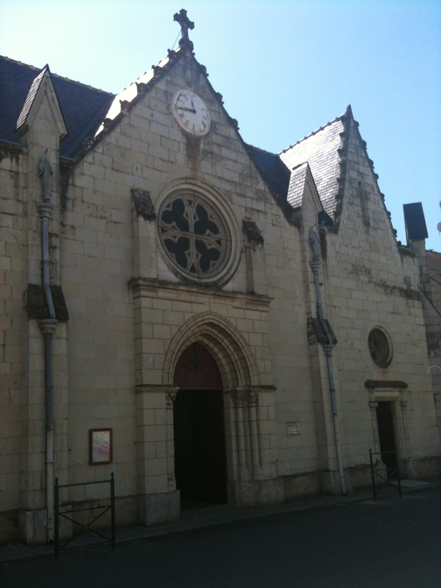 Facade de l'Eglise de Varennes-sur-Loire